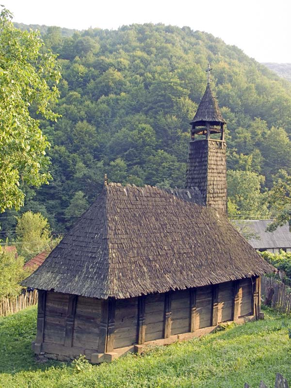 Vălari, partea de nordest a bisericii. Foto: Alexandru Baboş, iulie 2007.